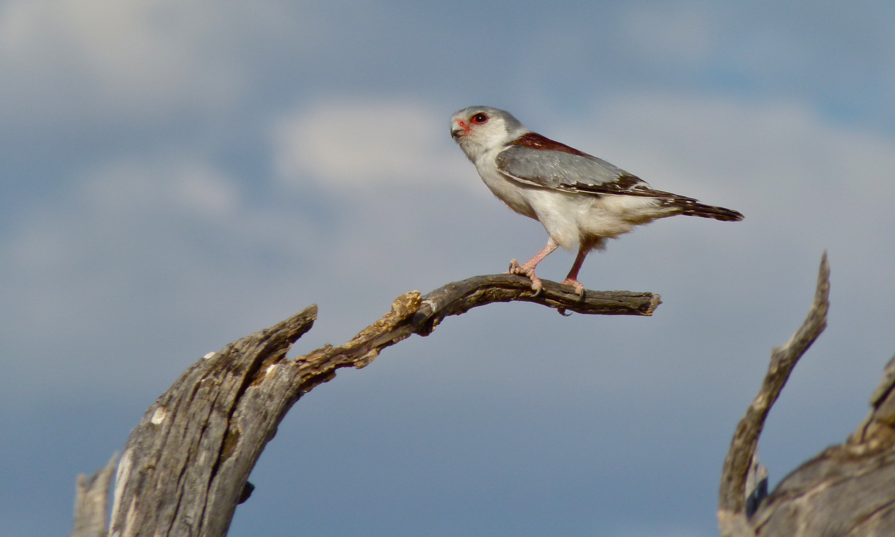 Auob Riverbed, Kgalagadi Transfrontier Park, SOUTH AFRICA